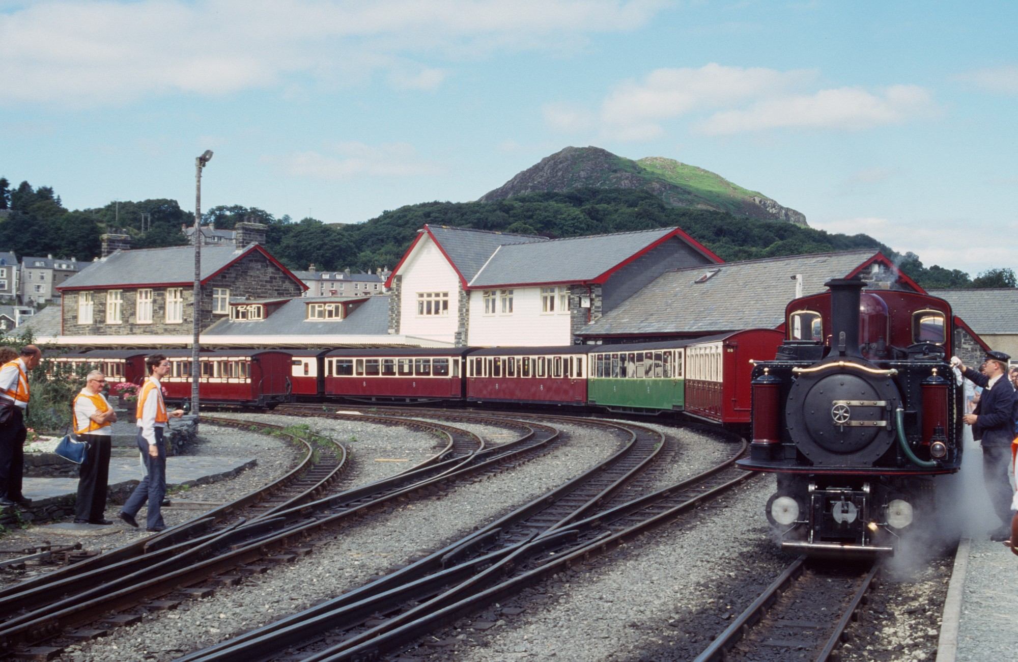 en: Porthmadog Harbour station, a train with "Merddin Emrys" is ready for departure de: Der Hafenbahnhof in Porthmadog, ein Zug mit "Merddin Emrys" steht zur Abfahrt bereit